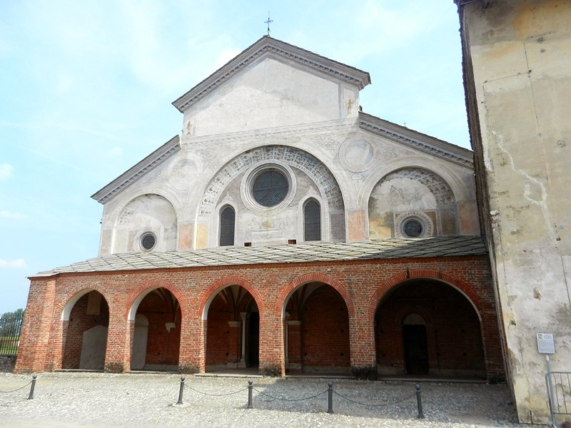 Staffarda - Facciata della Chiesa abbaziale